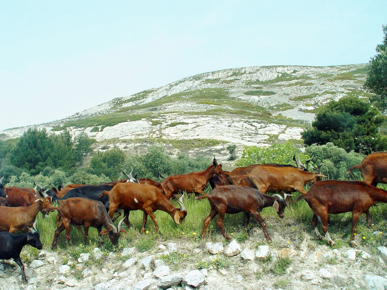 Troupeau de chèvres du Rove dans la garrigue au dessus du village du Rove (Bouches du Rhône, France)